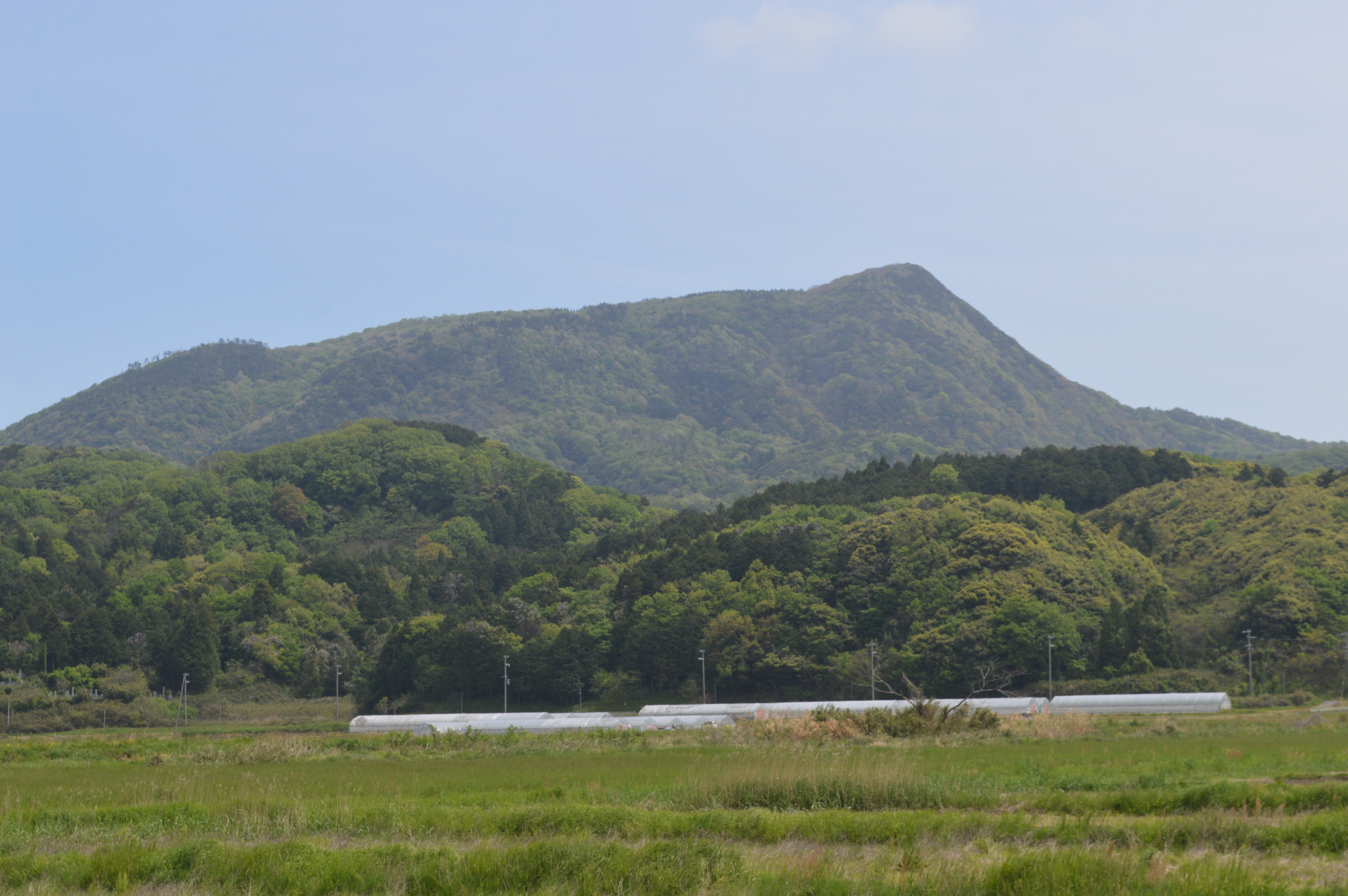 京都府京丹後市丹後町にある依遅ヶ尾山。丹後町成願寺から撮影。